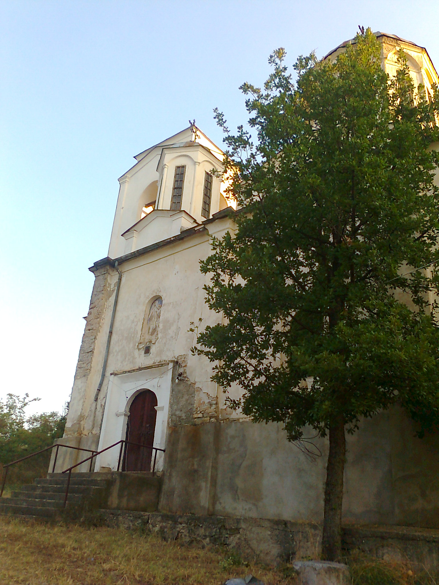 Влез во црквата Св. Архангел Михаил во Чичево